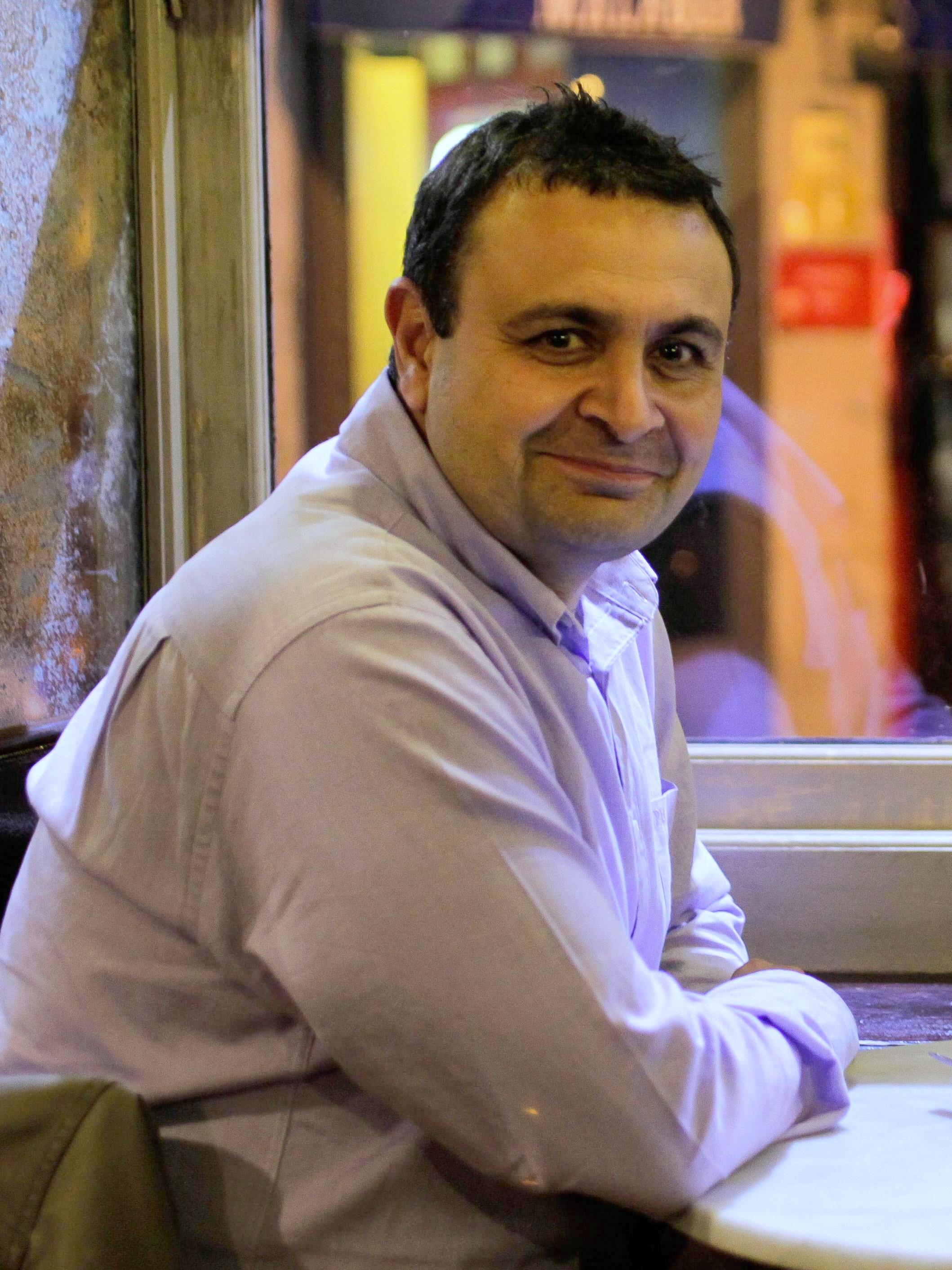 El politólogo Ignacio Sánchez-Cuenca publica La impotencia democrática (Catarata). "Con el sistema institucional que hemos creado con el euro, estamos atados de manos". "Los países del sur tienen que lanzar un órdago a la UE: si cambian los términos, nos quedamos; si no, es mejor irse". "Sobre la carroña que produce la crisis, vuelan unos buitres dispuestos a lanzarse a ver cuál coge la mejor parte"